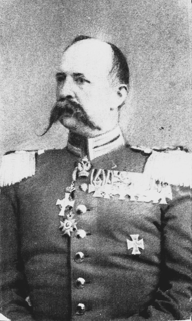 General-Lieutenant Albert von Zingler